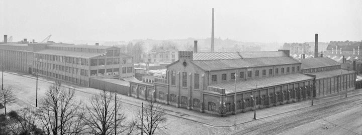 Alkuperäinen kuvaus: Kone- ja Siltarakennus Oy:n tehdasrakennus osoitteessa Hämeentie 7–9 – Haapaniemenkatu 1–5. Kuva otettu risteyksen toiselta puolen Hämeentie 22:n asuinkerrostalon yläkerroksista. Lisähuomautus: Rajattu alkuperäisestä kuvasta.